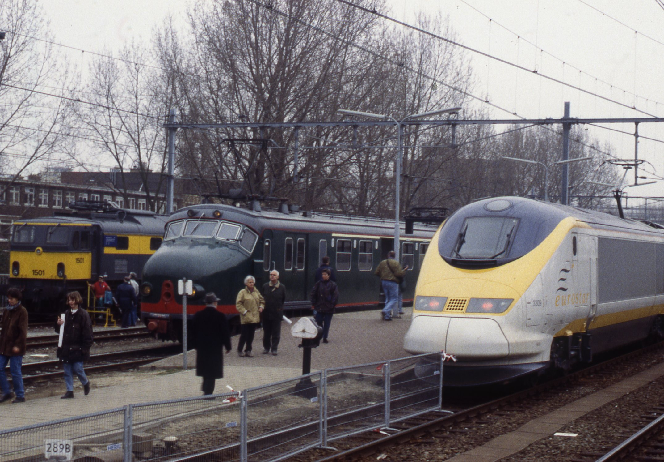 Eurostar in Rotterdam samen met de 1501 en Mat 46 tijdens de open dagen 6-7 april 1996.